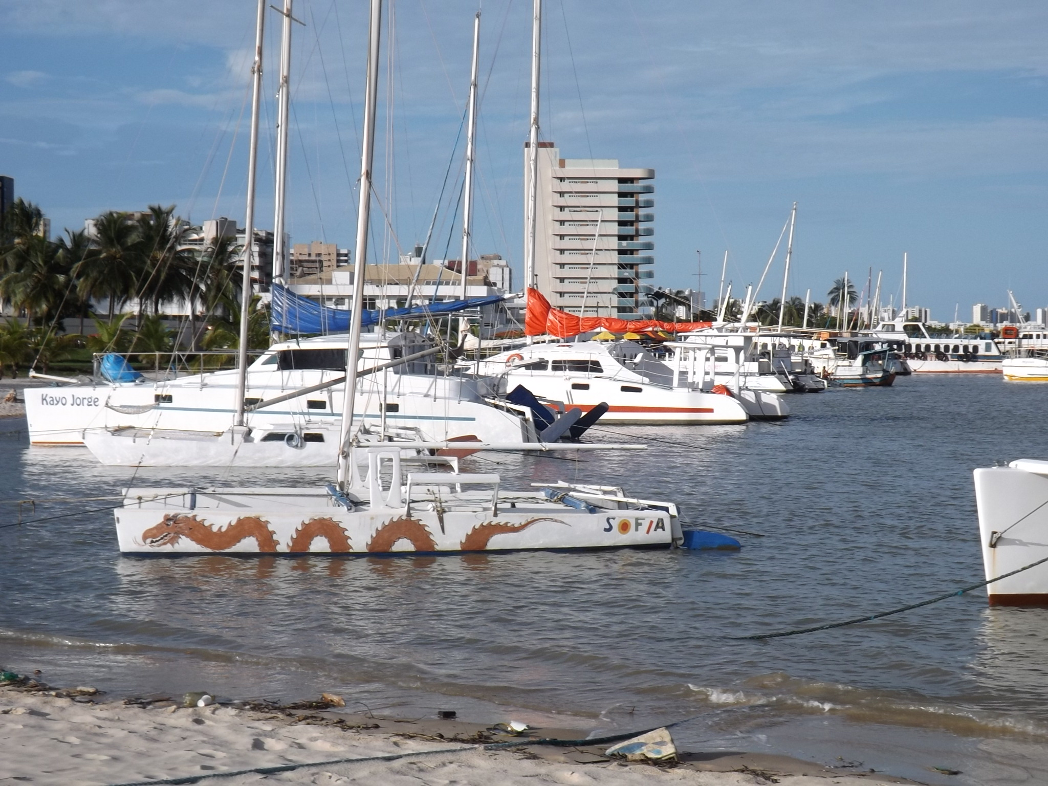 Fotografia tirada na Praia da Ponta D'areia localizada no Parque estadual da Lagoa da Jansen.